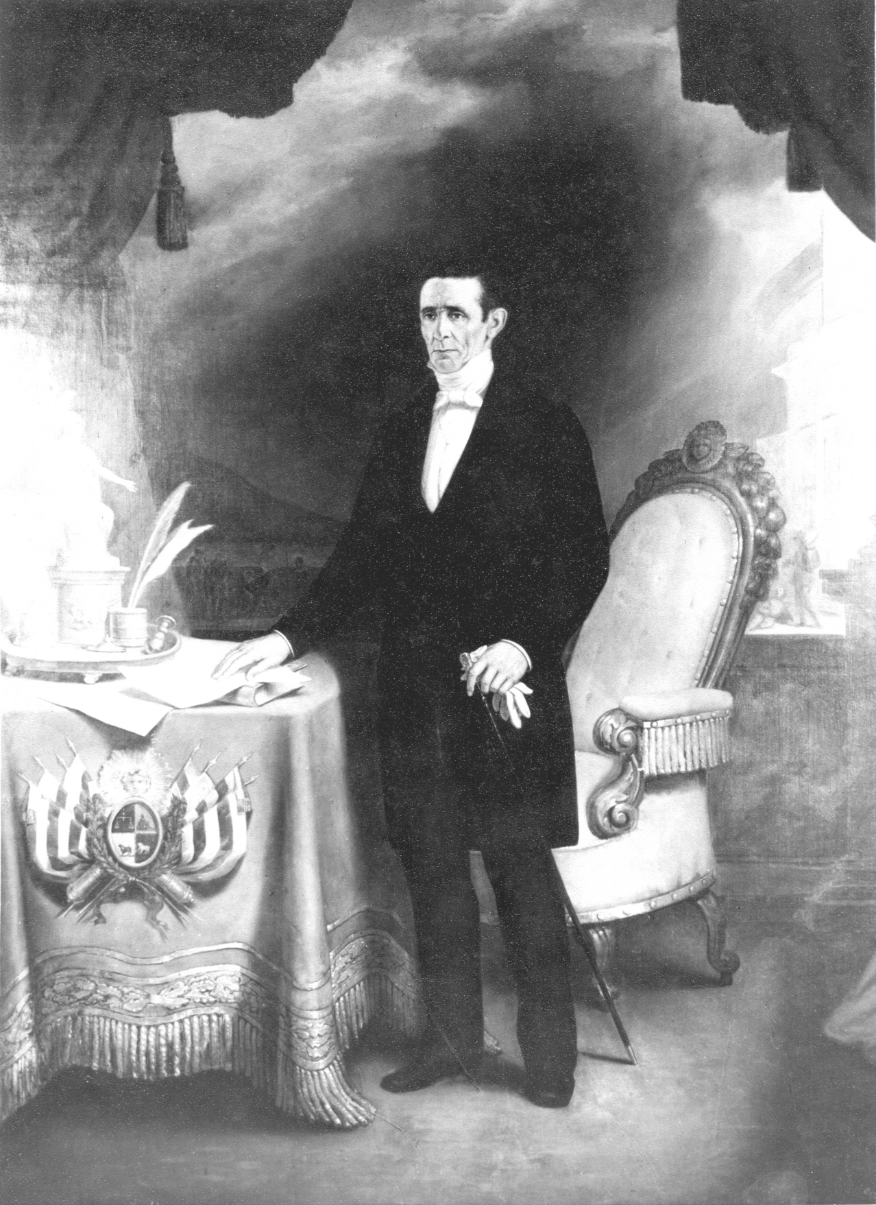 Retrato de Joaquín Suárez. Político uruguayo presidente interino entre 1843 y 1852.